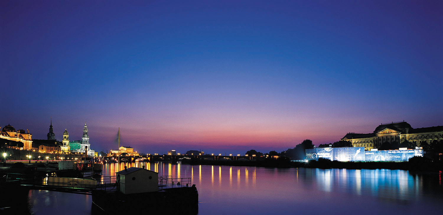 The Elbe River at Dresden.